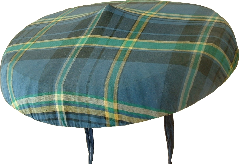 Le salako est un couvre-chef typique des îles des Saintes (Guadeloupe - France)